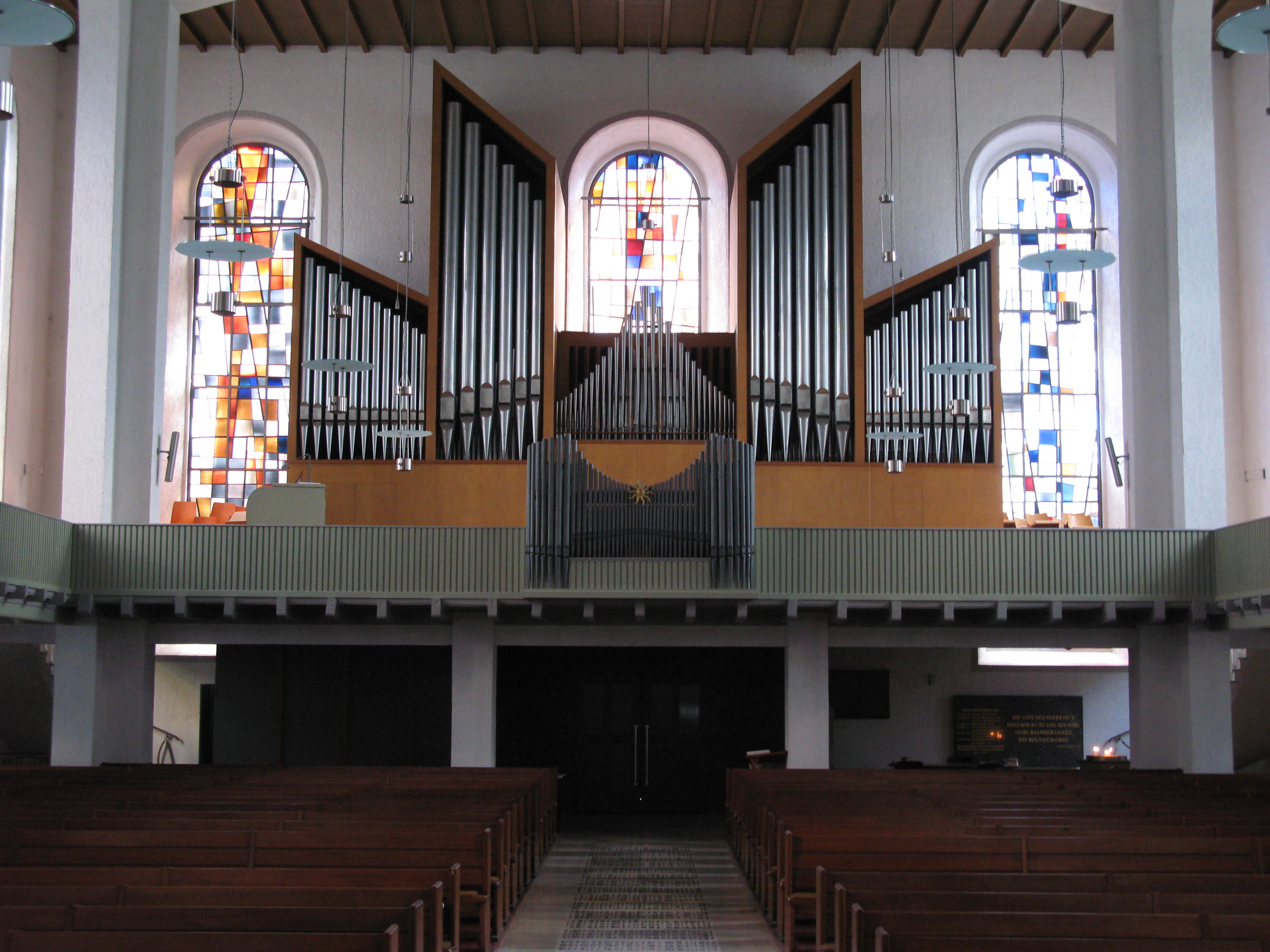 Orgel der Konkordienkirche in Mannheim. Gebaut von Friedrich Weigle in den Jahren 1952 bis 1959.